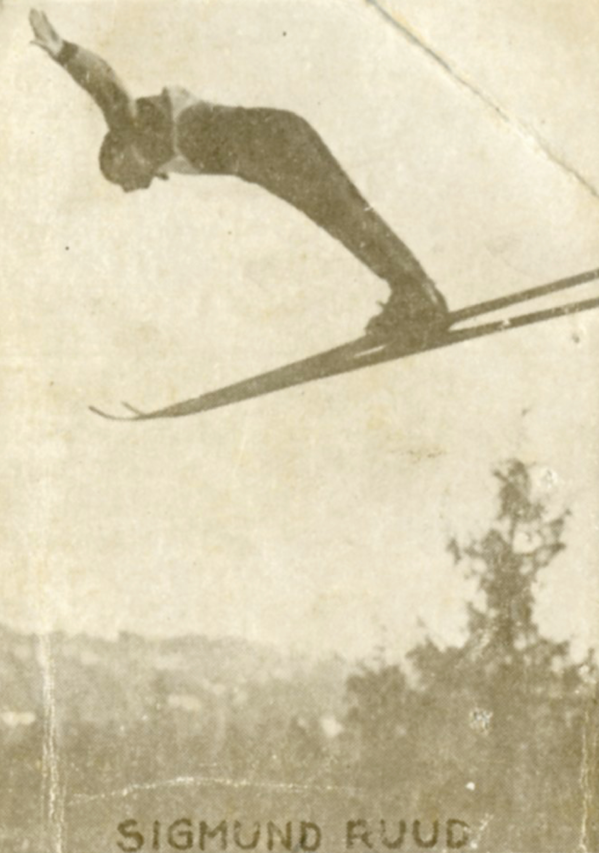 Format: Samlekort Dato / Date: ca. 1930 (dokumentet) Fotograf / Photographer: Ukjent Wikipedia: Sigmund Ruud (1907 - 1994) Wikipedia: Odnesbakken Eier / Owner Institution: Trondheim byarkiv, The Municipal Archives of Trondheim Arkivreferanse / Archive reference: Sportsklubben Freidig: Sigarettfoto ca. 1930 (Løpenr. 75) F23971 Tekst på baksiden: Sigmund Ruud er en av vore mest berømte storhoppere av de yngre aarganger. Han er en krafthopper av rang og han har verdensrekord i skihopp med 72 meter, hoppet i Odnesbakken ved Fluberg i 1927. Han deltok for Norge i hoprend ved Vinterolympiaden i St. Moritz. Merknad: Disse samlekortene med bilder av norske og internasjonale idretthelter fulgte med i sigarettpakker på 1920 og 30-tallet - derav tobakksreklamen på baksiden. Samlekortene kommer fra Sportsklubben Freidigs arkiv, og inneholder nærmere 90 unike kort pent plassert i et samlealbum. Samleren var den senere skipsmegler Finn Følling (1914 – 1985).